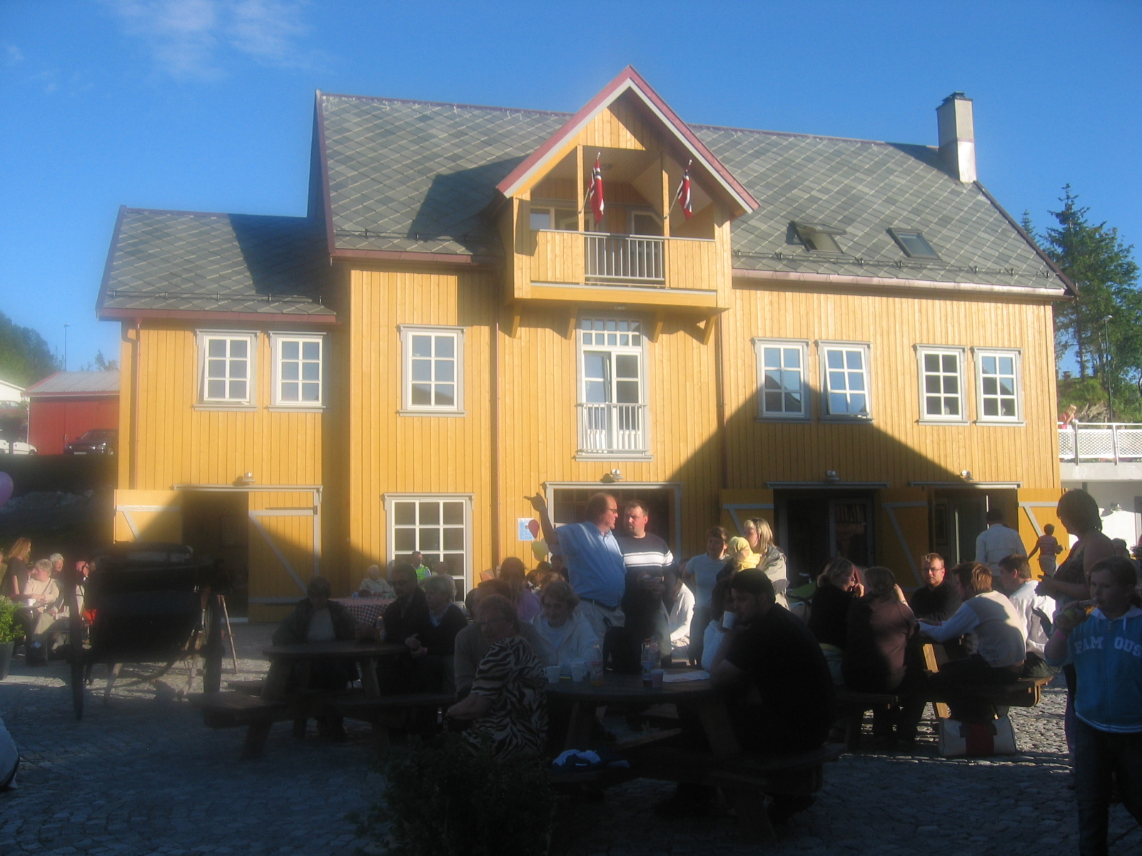 Main building at Nevernes havn, Brønnøy, Norway